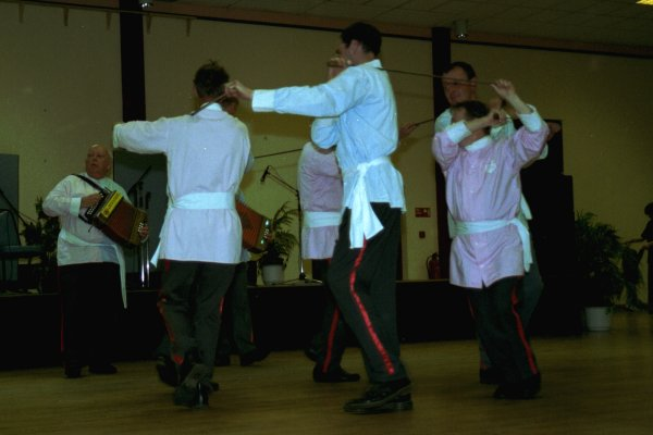 Goathland Plough Stots – Schwerttänzer; Beschreibung: Die Goathland Plough Stots beim World Millennium Sword Spectacular, Whitby, England, Mai 2000